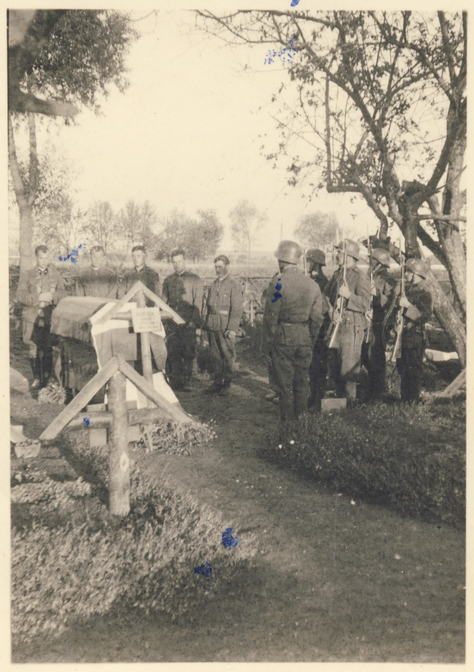 Magyar honvéd temetése Oroszországban, Bucz Sándor hagyatéka